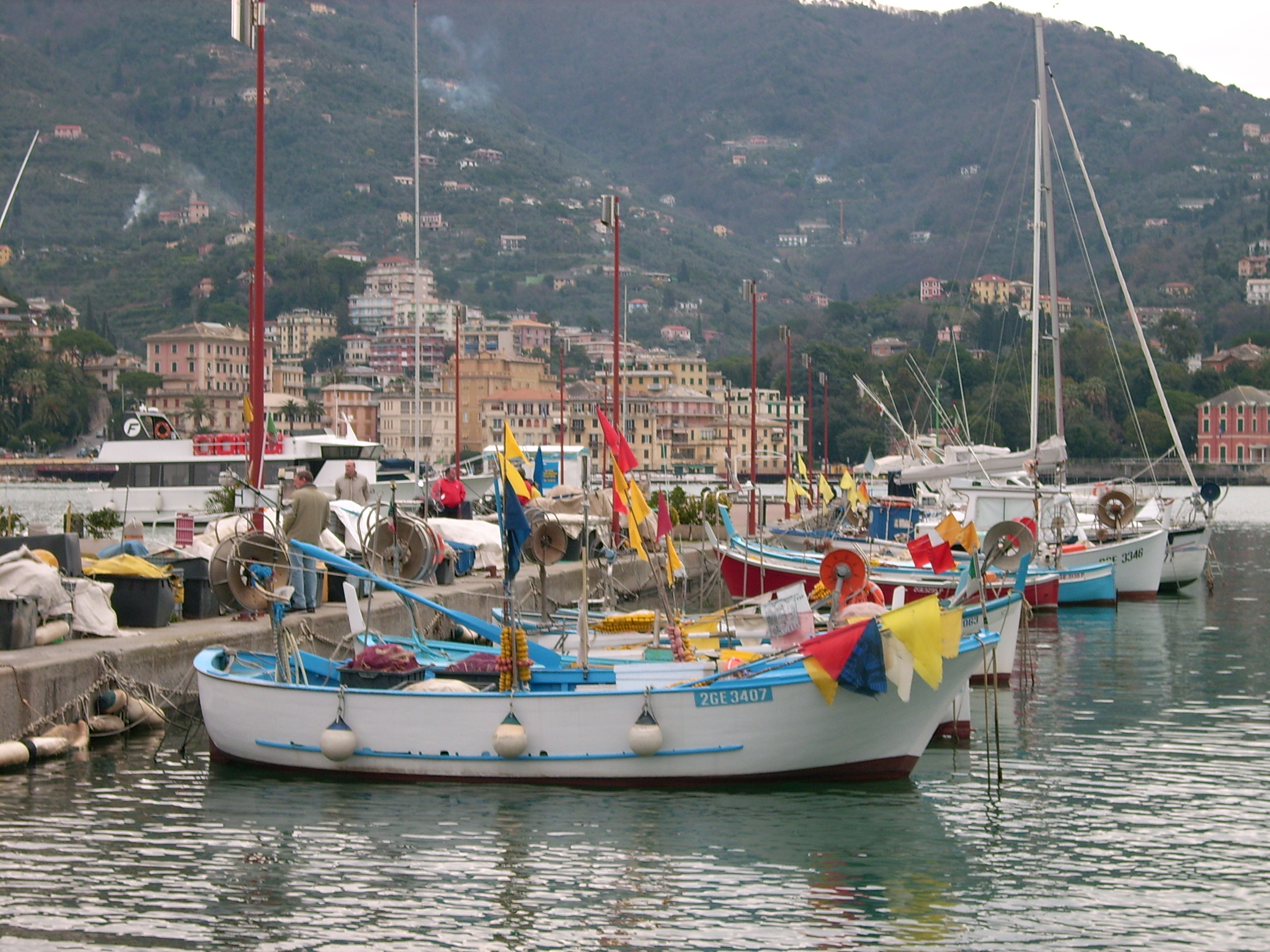 Tipiche imbarcazioni di Rapallo